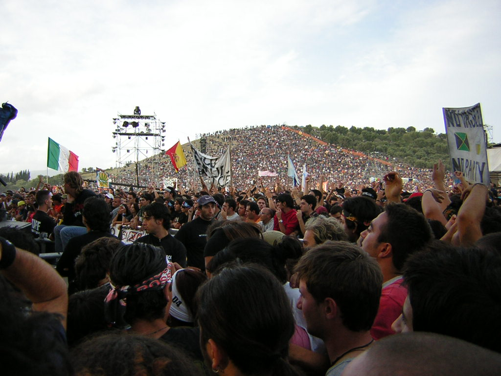 foto durante il concerto di Vasco a Catanzaro.